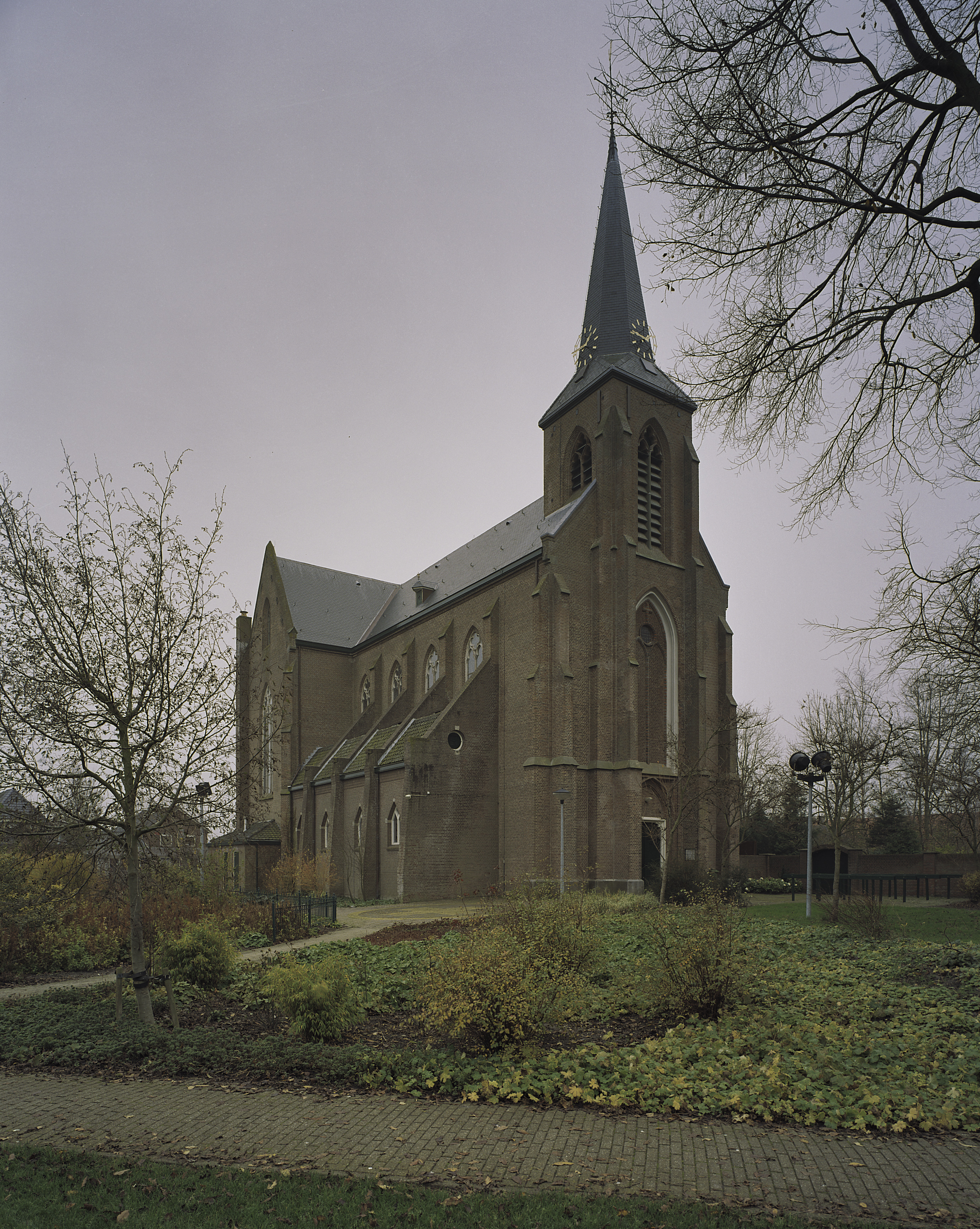 Sint Jacobus de Meerderekerk: Overzicht westgevel toren en noordgevel met lage zijbeuken (opmerking: Gefotografeerd voor Monumenten In Nederland Noord-Holland)